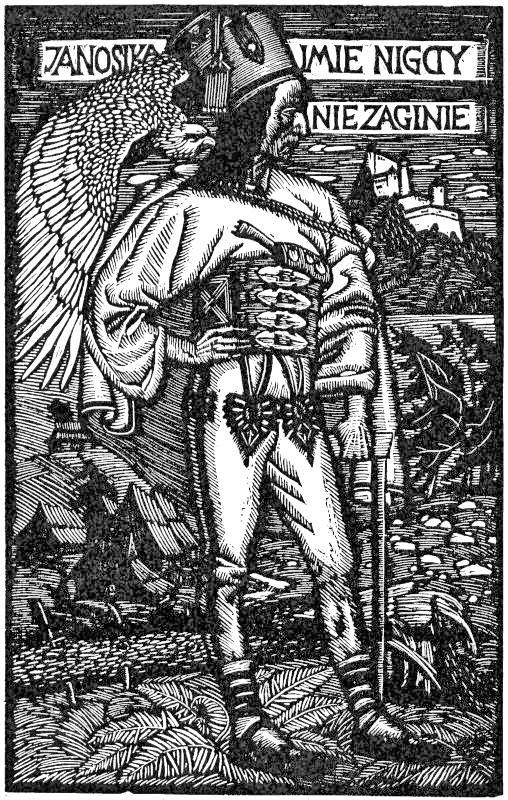 Janosik, wood engraving. The inscription says Janosika imię nigdy nie zaginie (en: The name of Janosik will never die), Muzeum Żup Krakowskich w Wieliczce